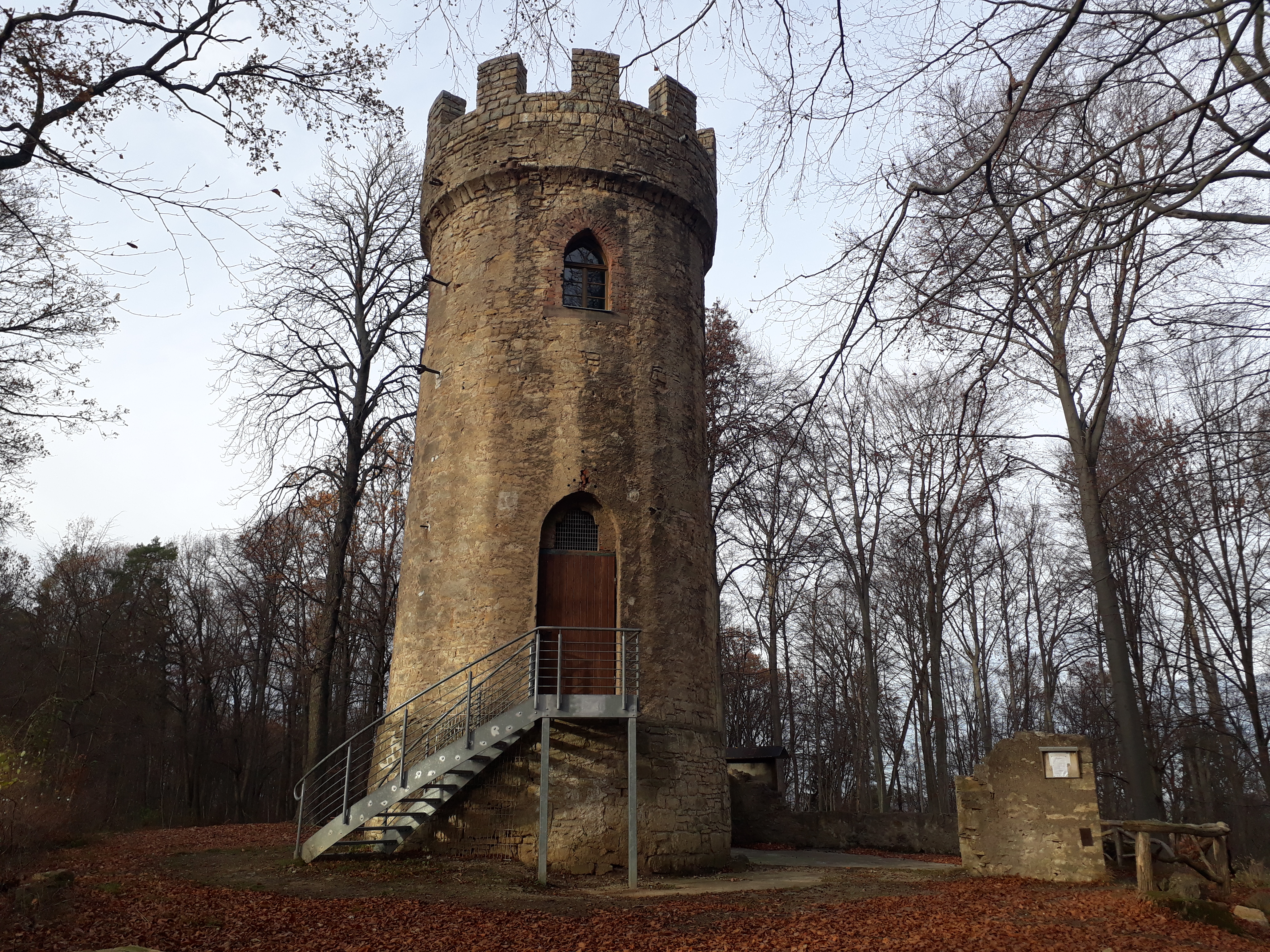 Hainturm bei Weimar, Thüringen